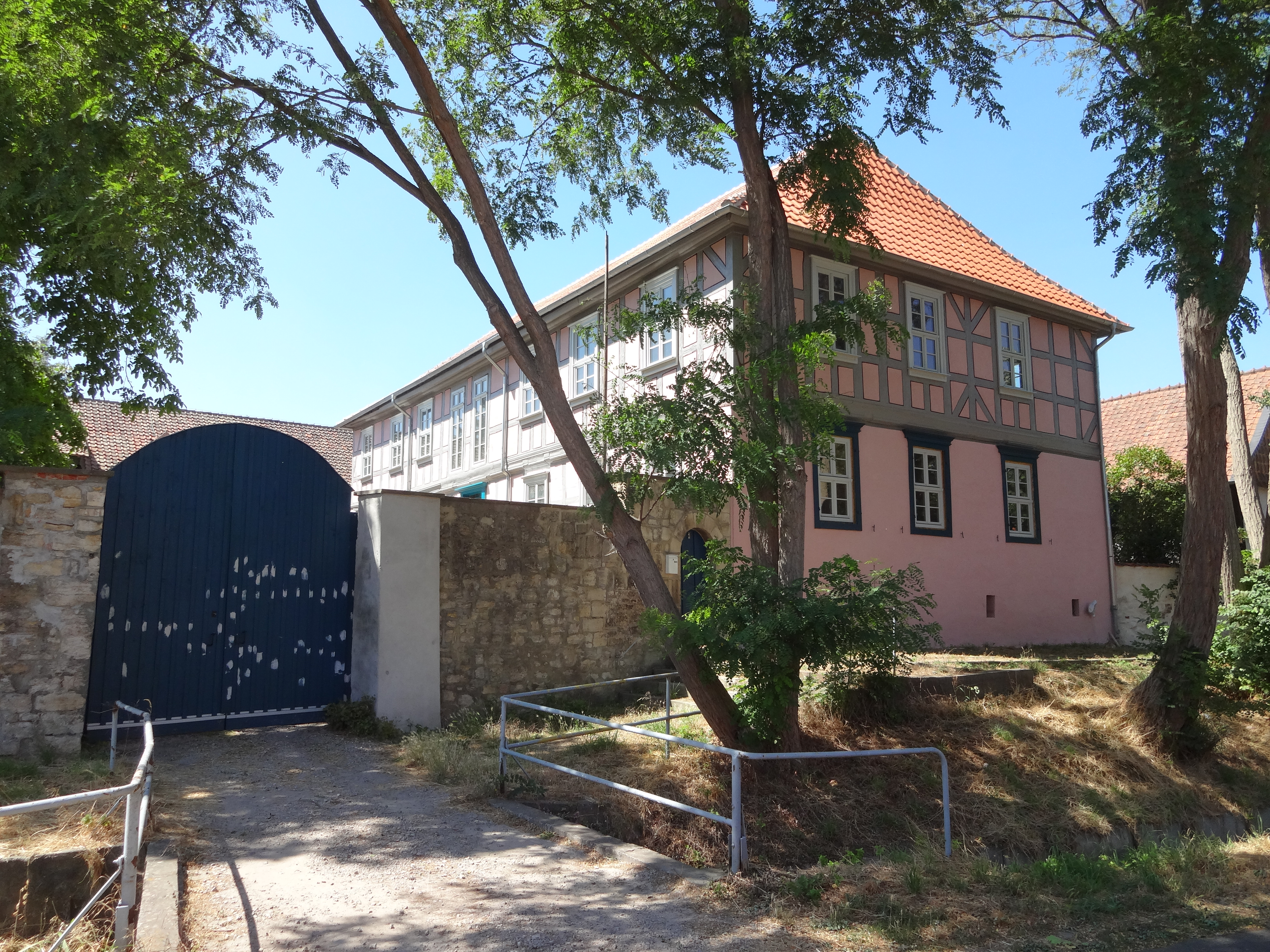 denkmalgeschütztes Pfarrhaus in der Straße Am Bache 1 in Dedeleben